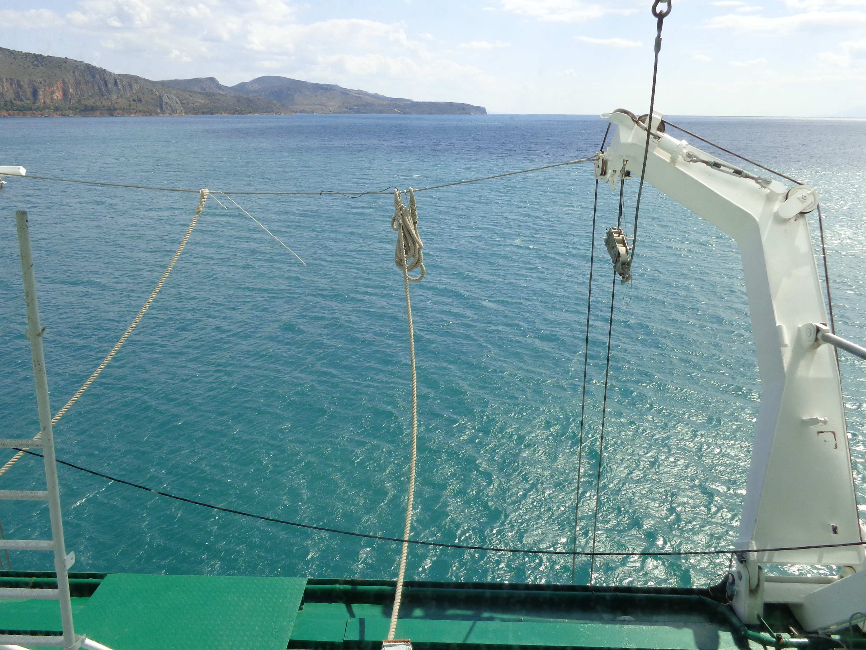 Ausgebrachtes Davit auf Deutschland (Schiff, 1998)